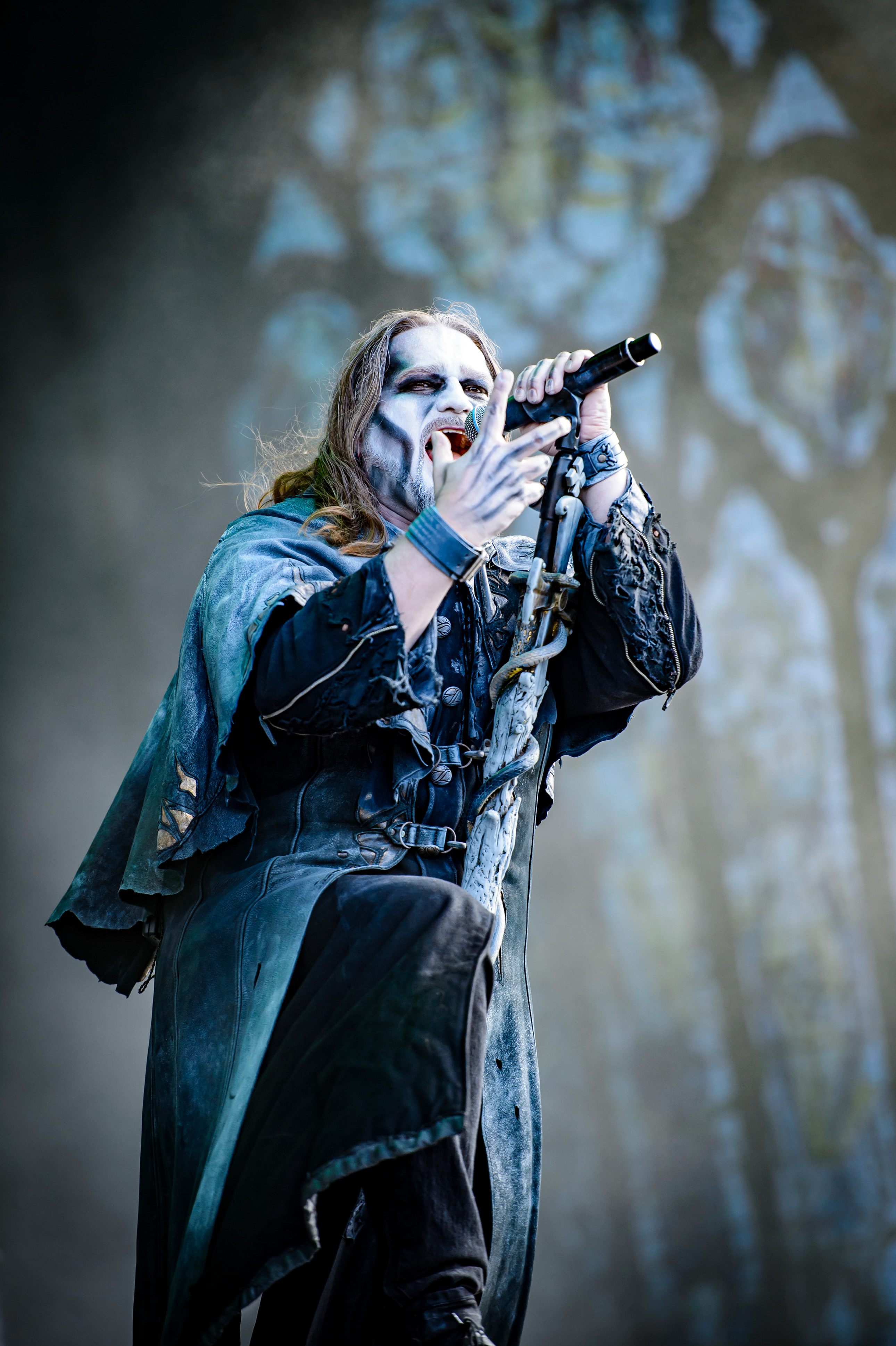 'Wacken Open Air 2017; Wacken': 'Powerwolf'